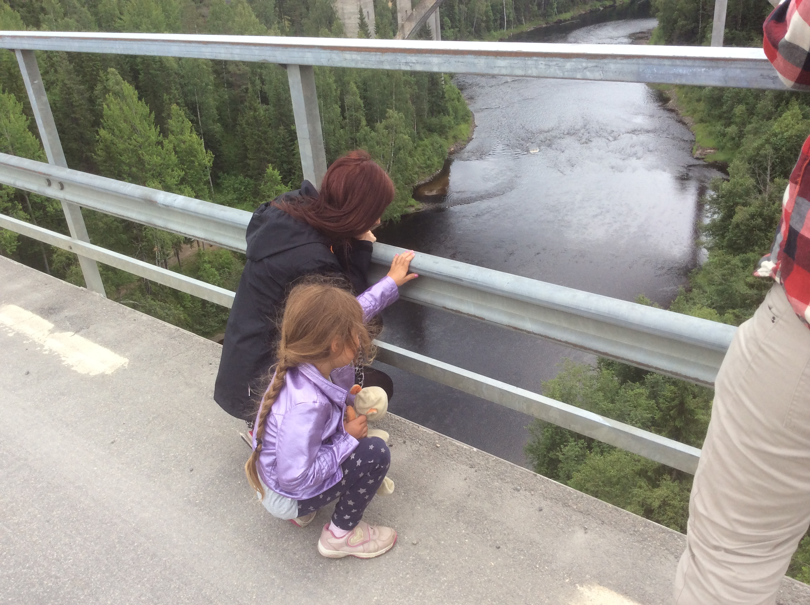 Den hissnande utsikten från vägbron.